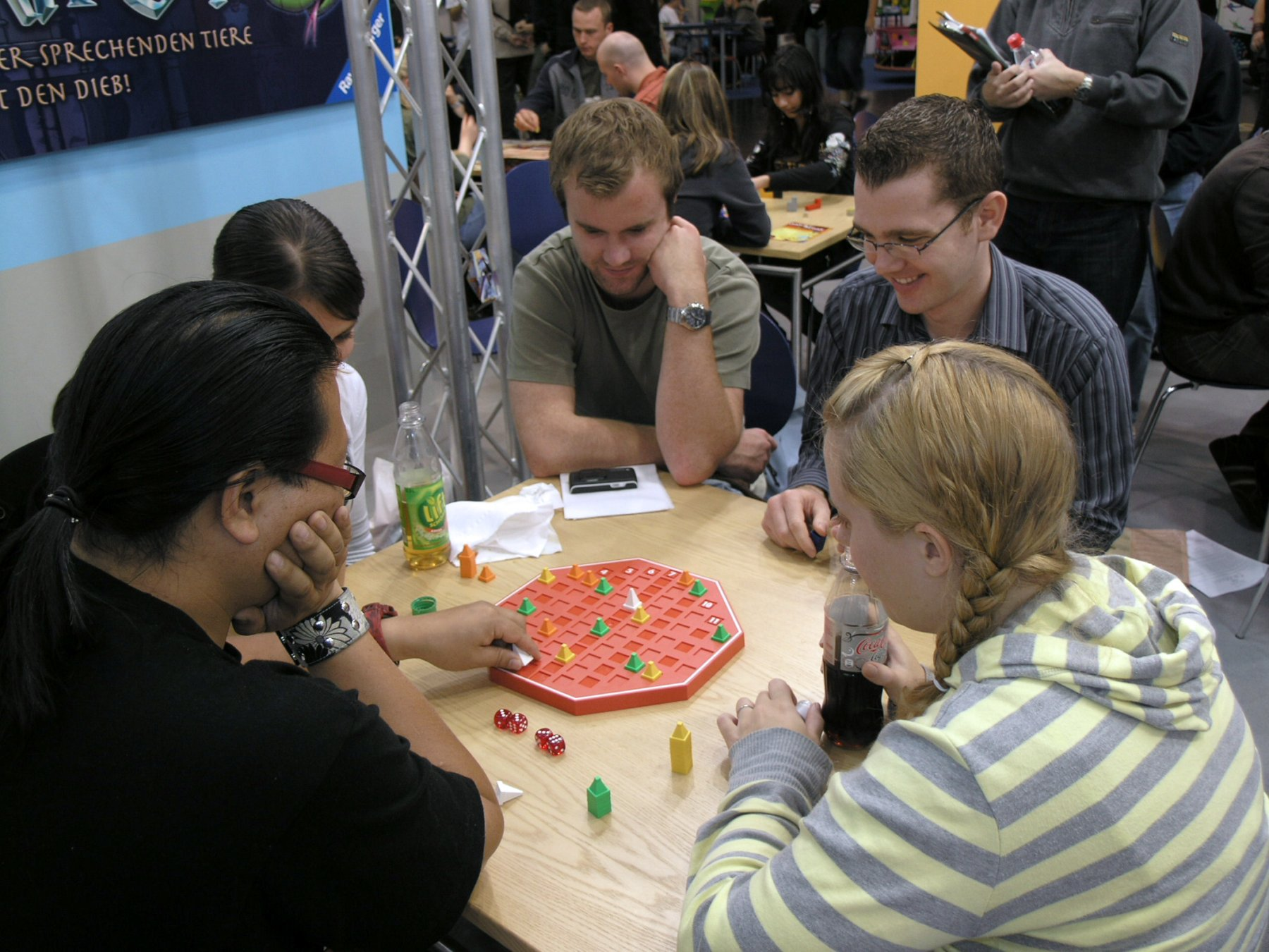 Can't Stop (Essen Spiel'07)